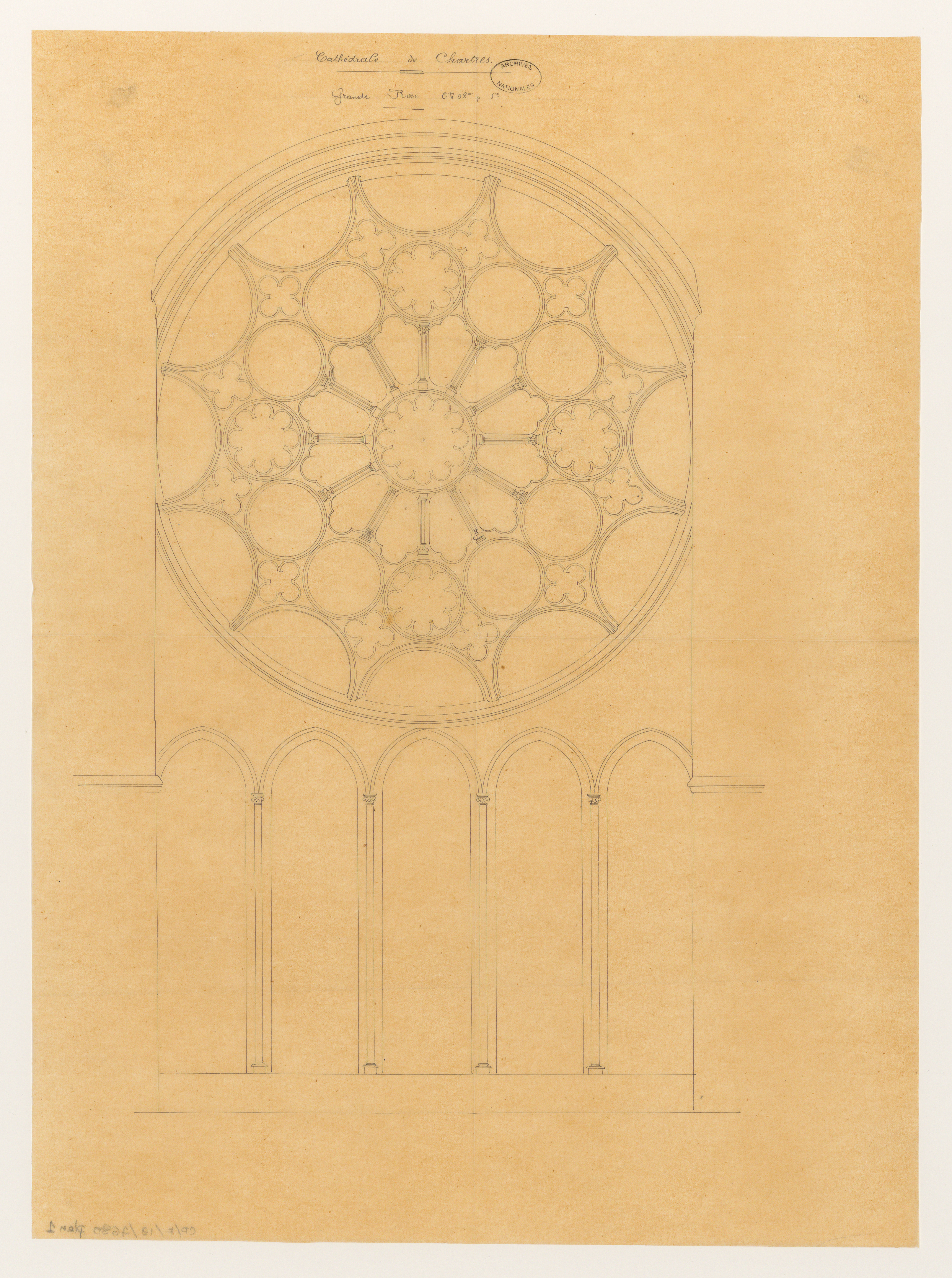 Cathédrale de Chartres. Grande rose. Plan issu des dossiers de travaux de restauration des cathédrales (1802-1912), conservés aux Archives nationales (inventaire et autres documents numérisés consultables en ligne).